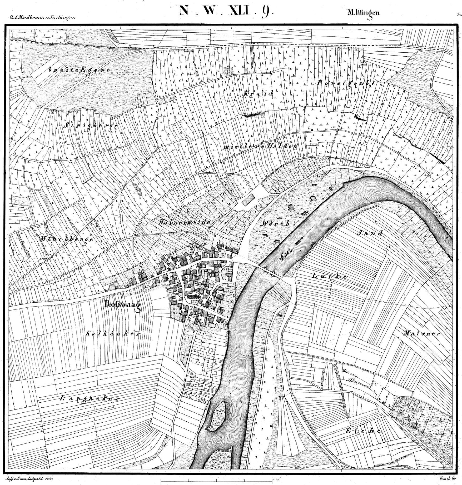 Roßwag auf der Urflurkarte NW XLI, Blatt 9, von 1833